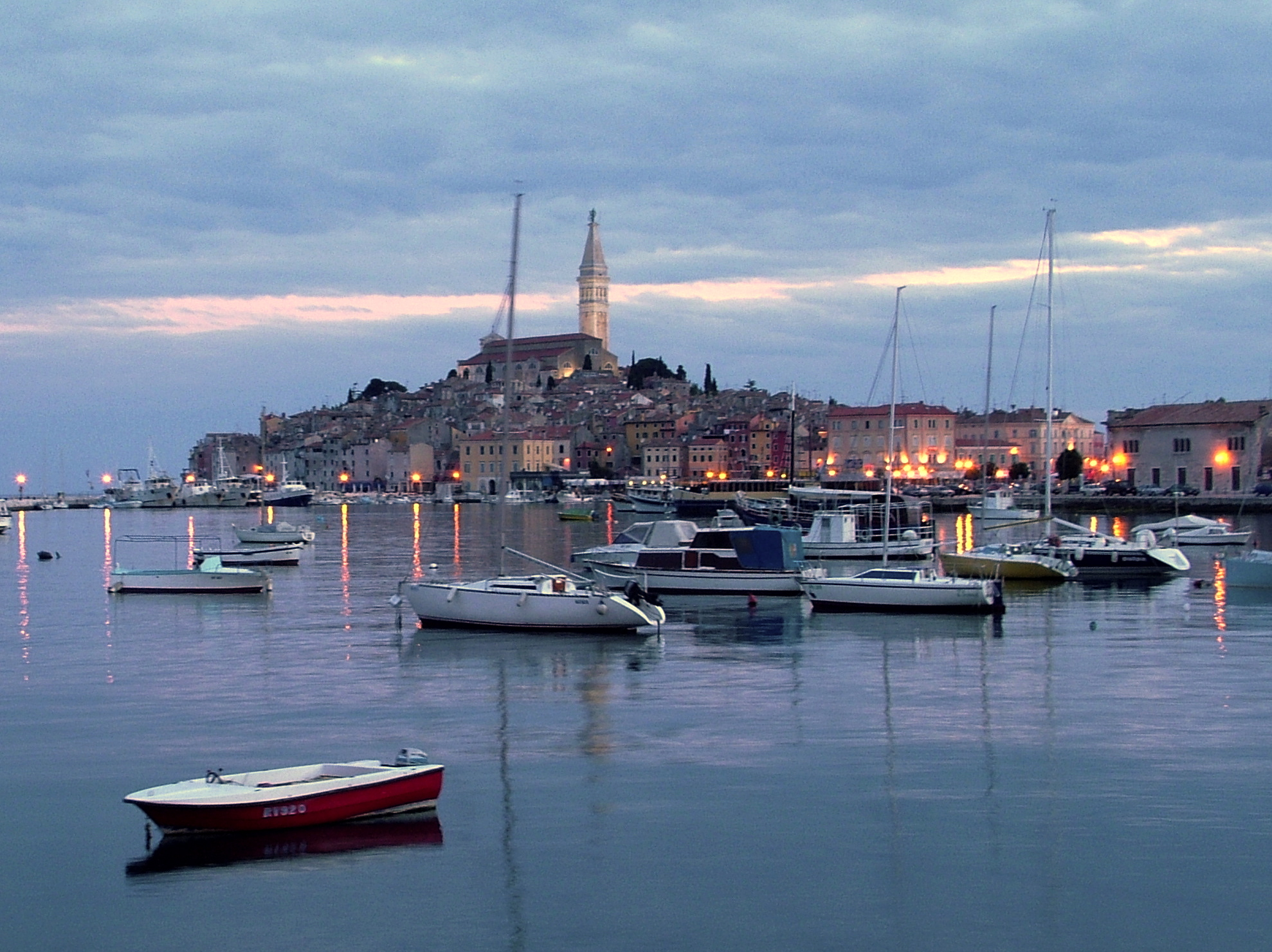 sunrise in Rovinj